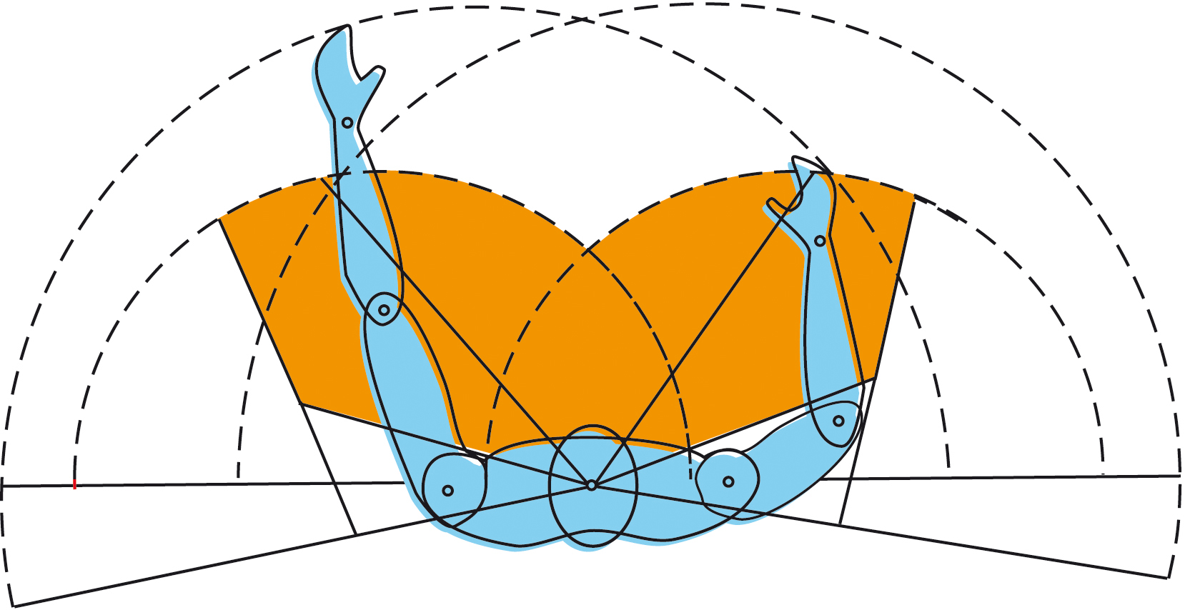 Ergonomia. Gizakion area eraginkorrak aldebiko simetriaren ardatzatik ikusiak.